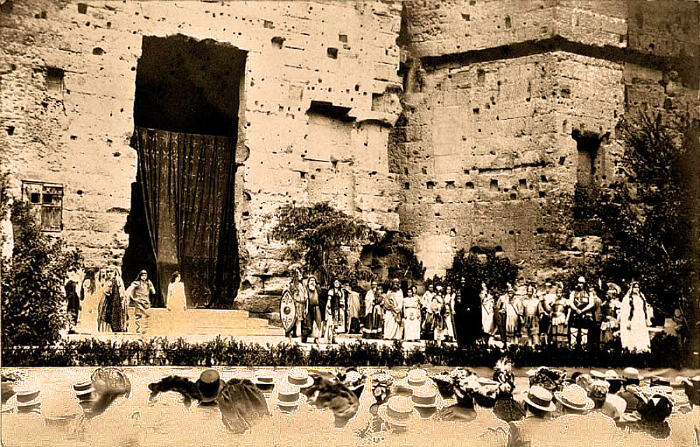 Fêtes romaines en 1869, première des Chorégies d'Orange